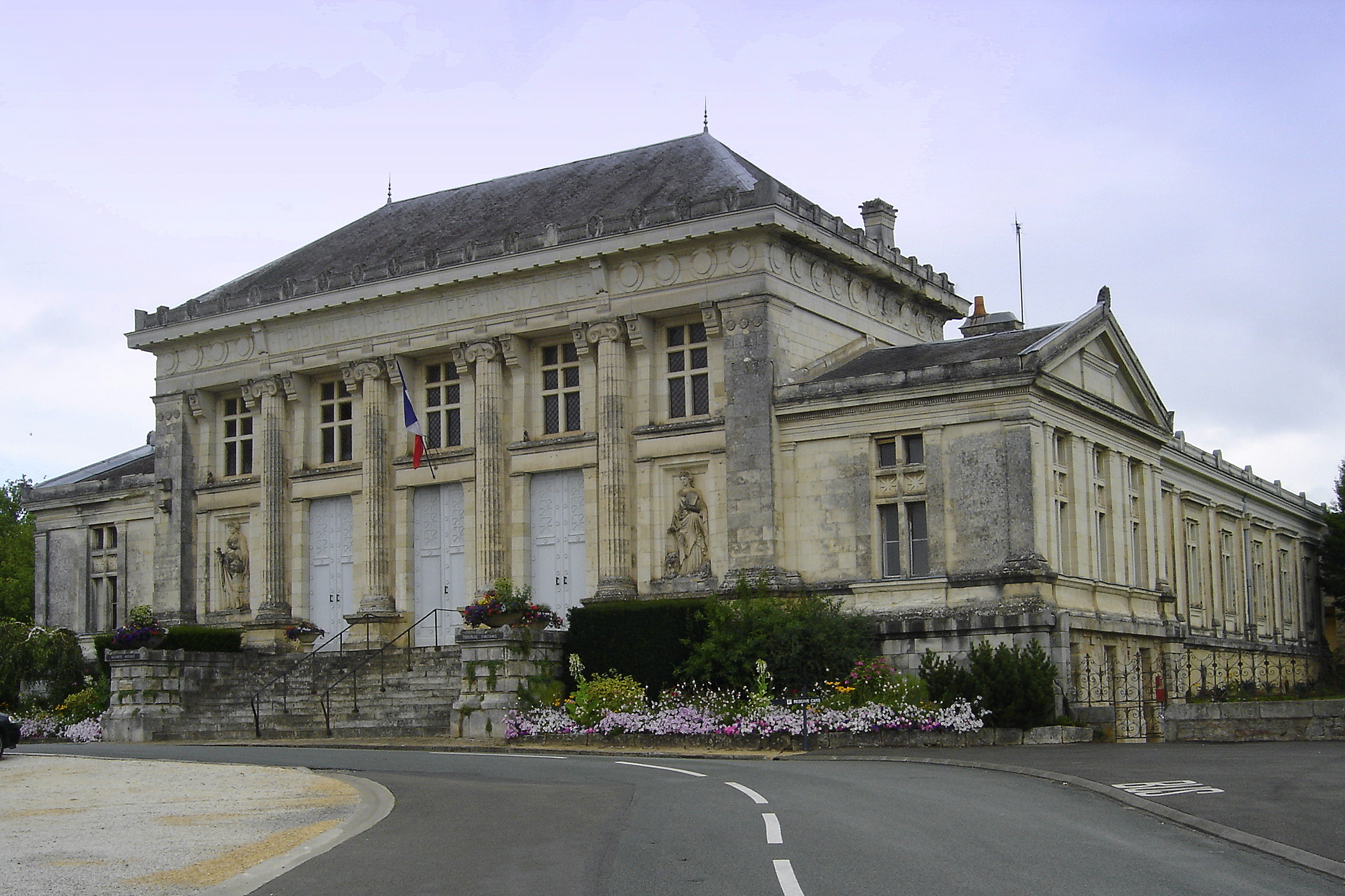 Extérieur du palais de justice de Baugé (Maine-et-Loire, France). .